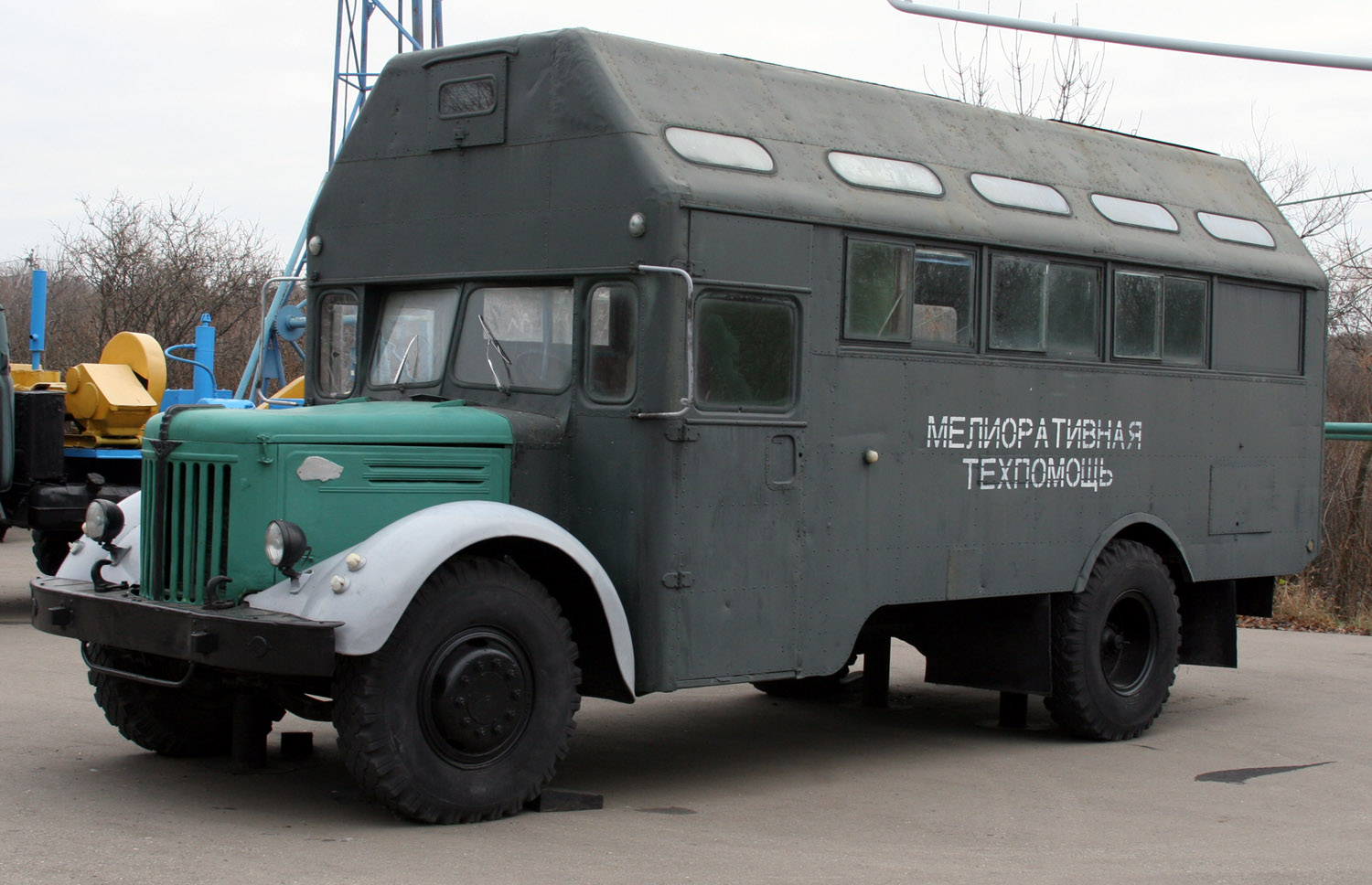 Мелиоративная техпомощь в Саратове на Соколовой горе